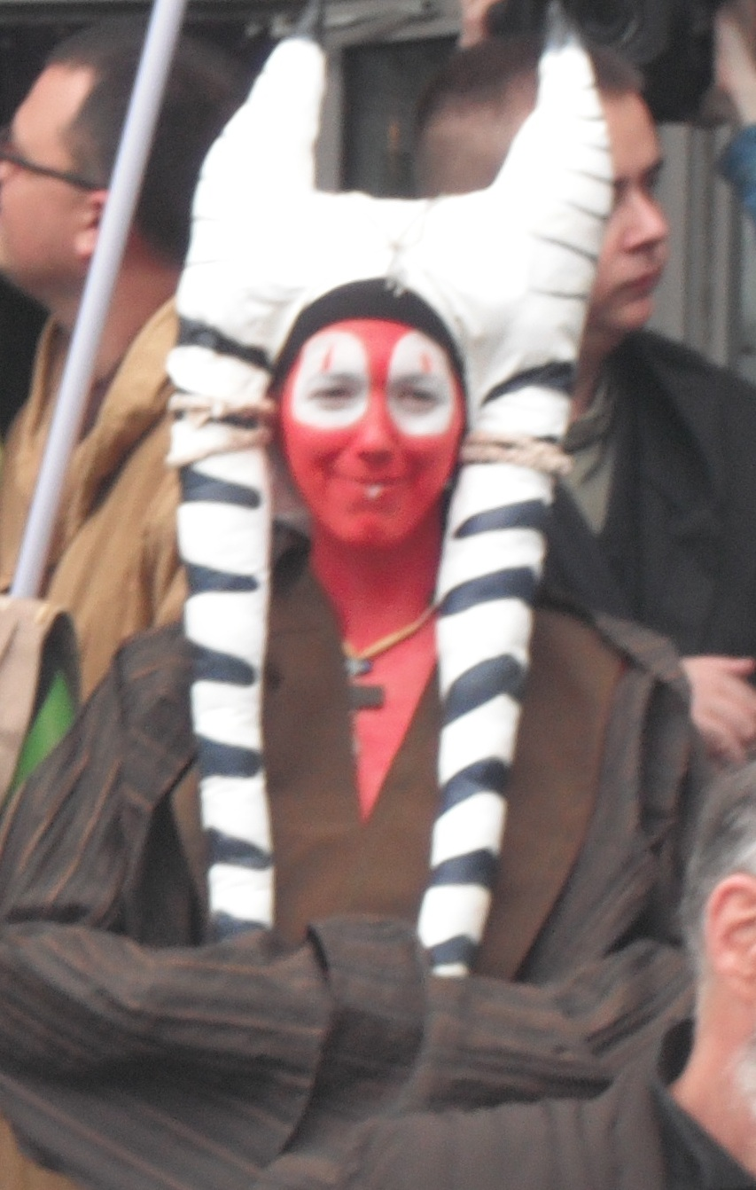 Cosplay of Shaak Ti cusset